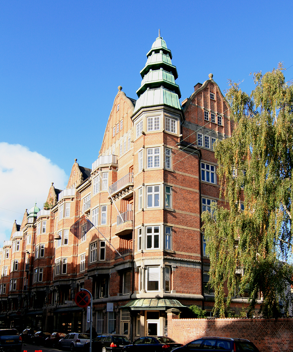 Store Strandstræde 21, København. Bygget 1908. Fredet.